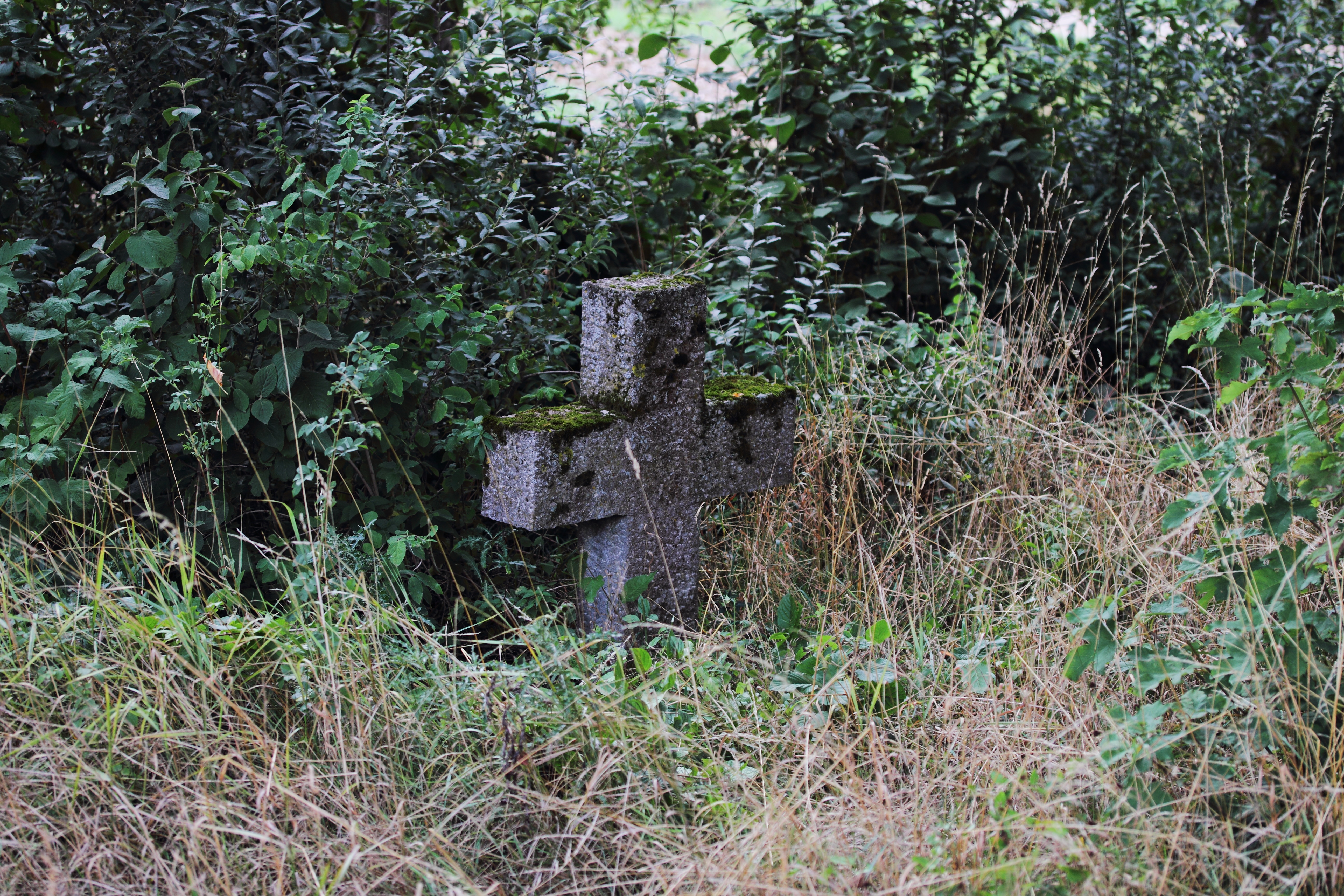 Das Sühnekreuz Niederstetten IV im Ortsteil Streichental.